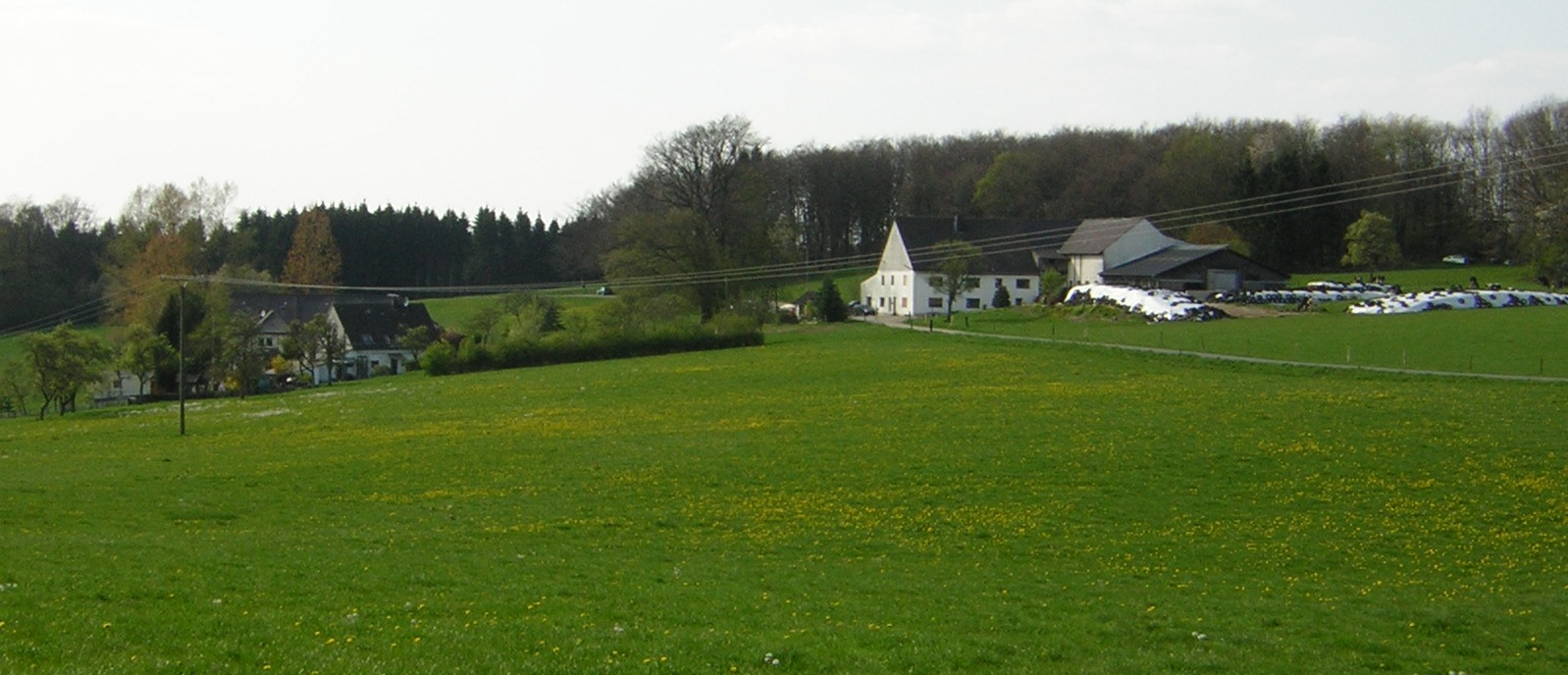 Hahnenberg in Wipperfürth Aufgenommen: 2005 mit Nikon Coolpix 2200